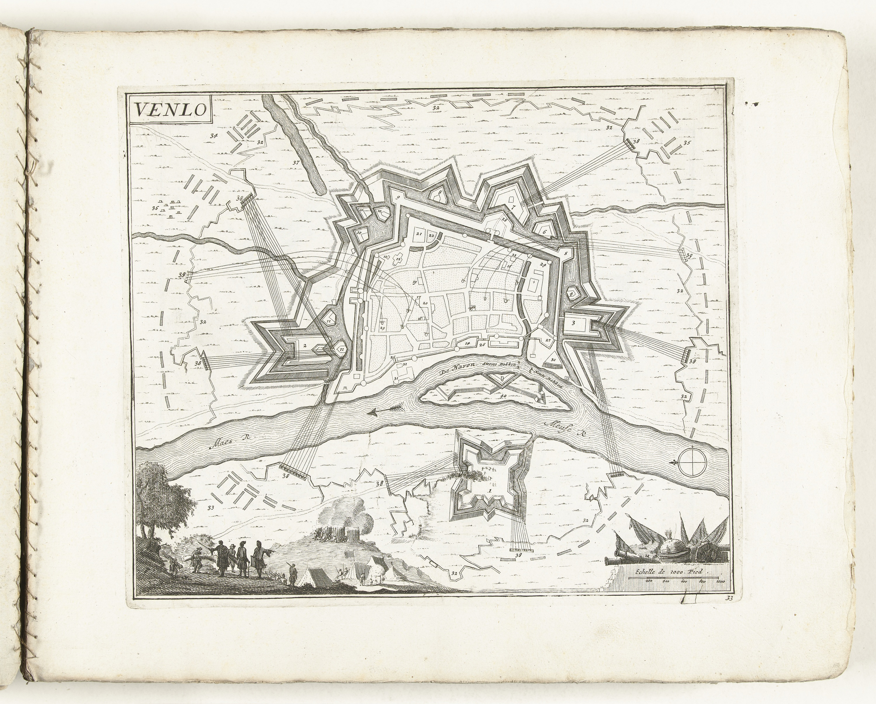 Plattegrond met het beleg van Venlo door de geallieerden, september 1702